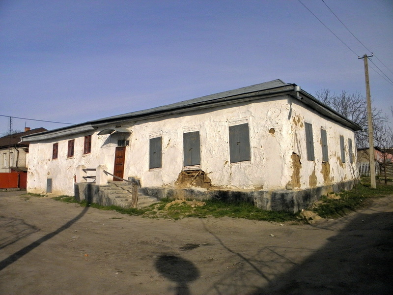 Єдина в Україні глинобитна синагога (XVIII століття)